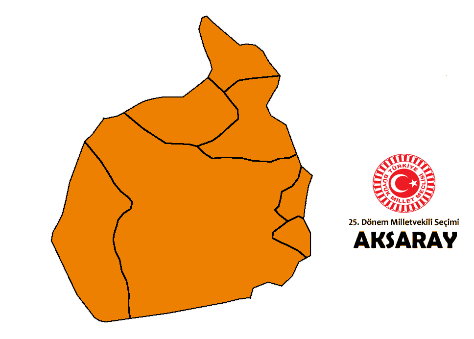 2015 genel seçim sonuçları